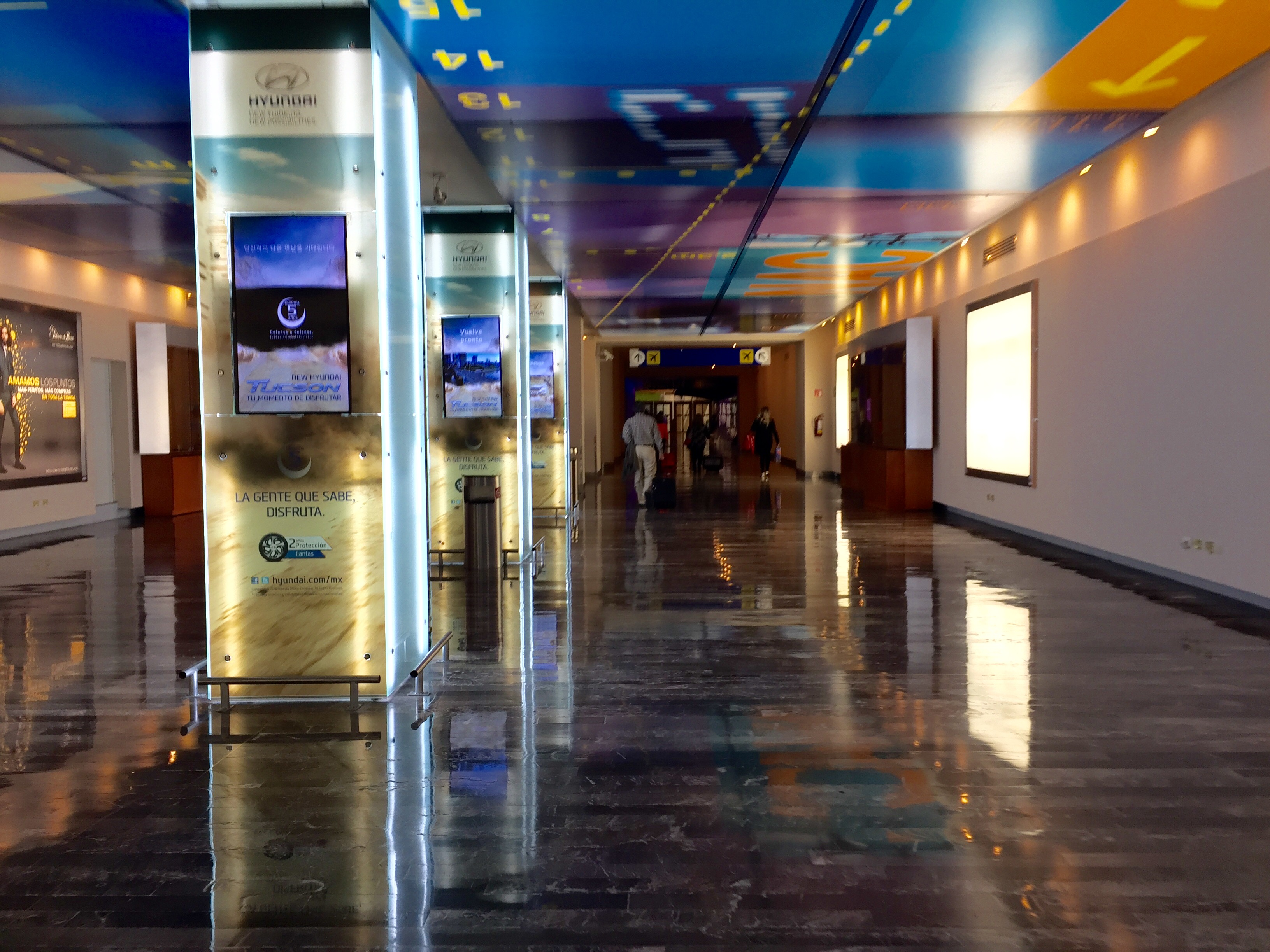 Pasillo hacia la terminal satélite del Aeropuerto Internacional de Monterrey.